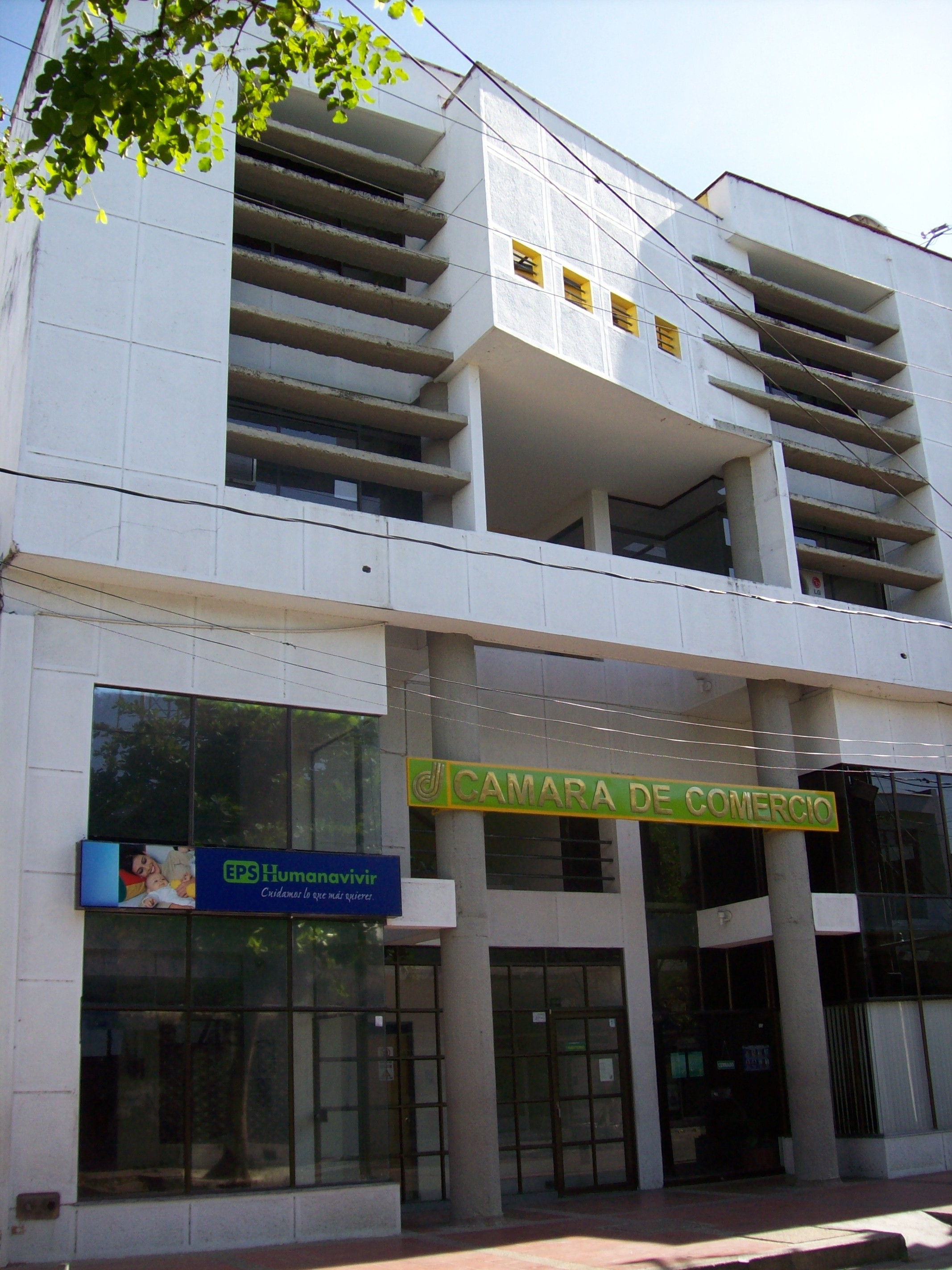 Edificio de la Cámara de Comercio de La Dorada.